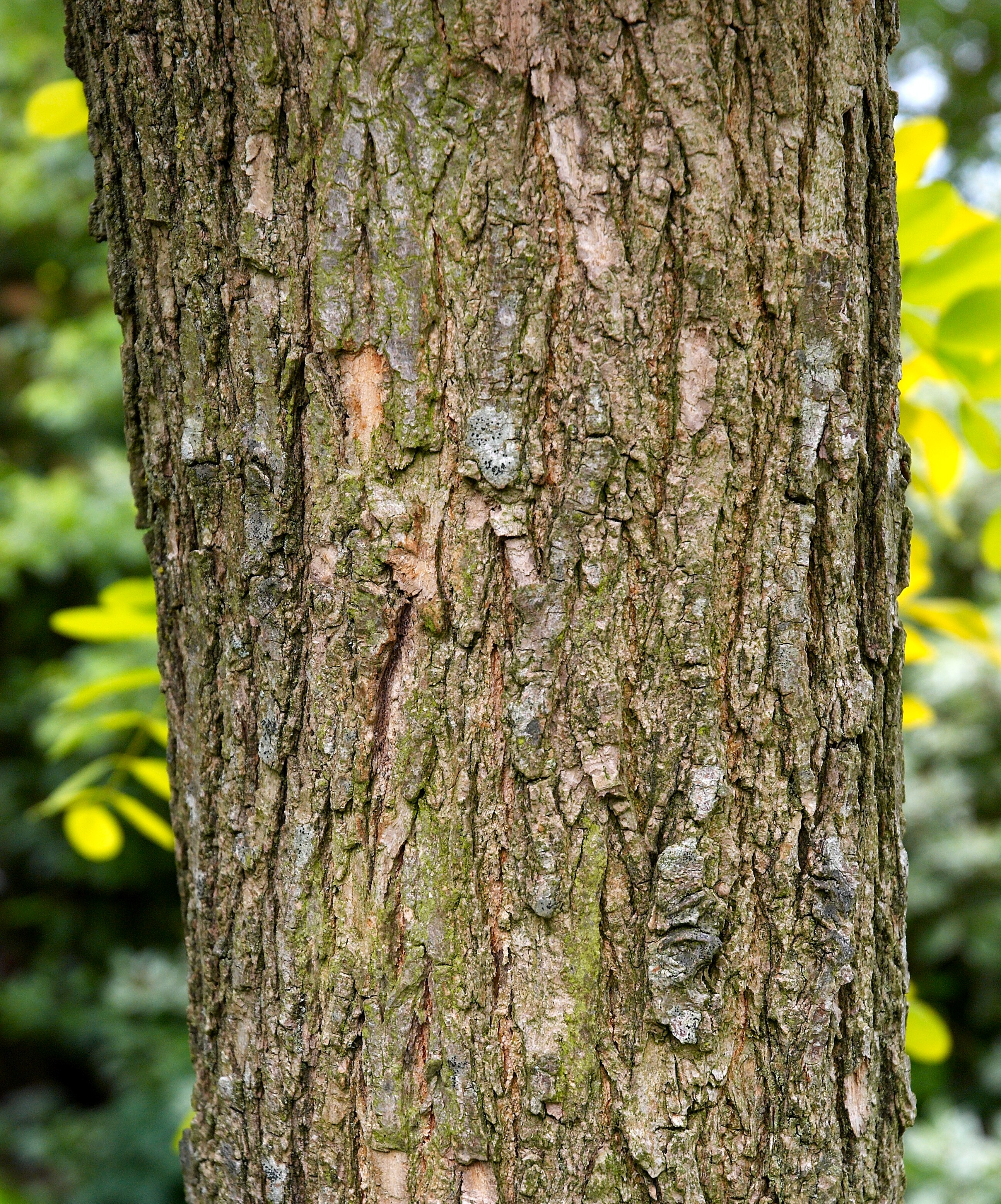 Robinia pseudoacacia 'Frisia' stem about 17 cm diameter